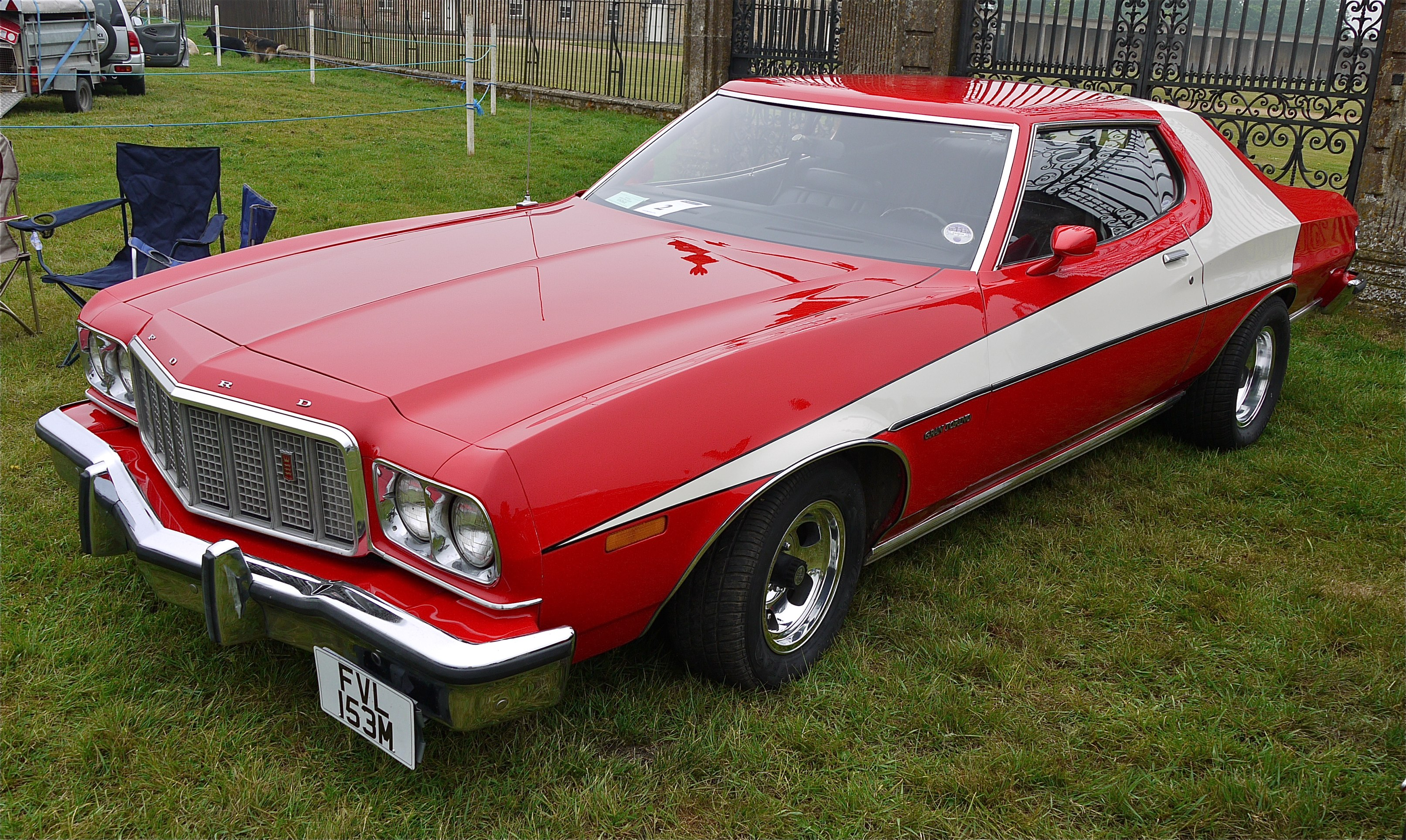 Panasonic G1 14-45 Lens